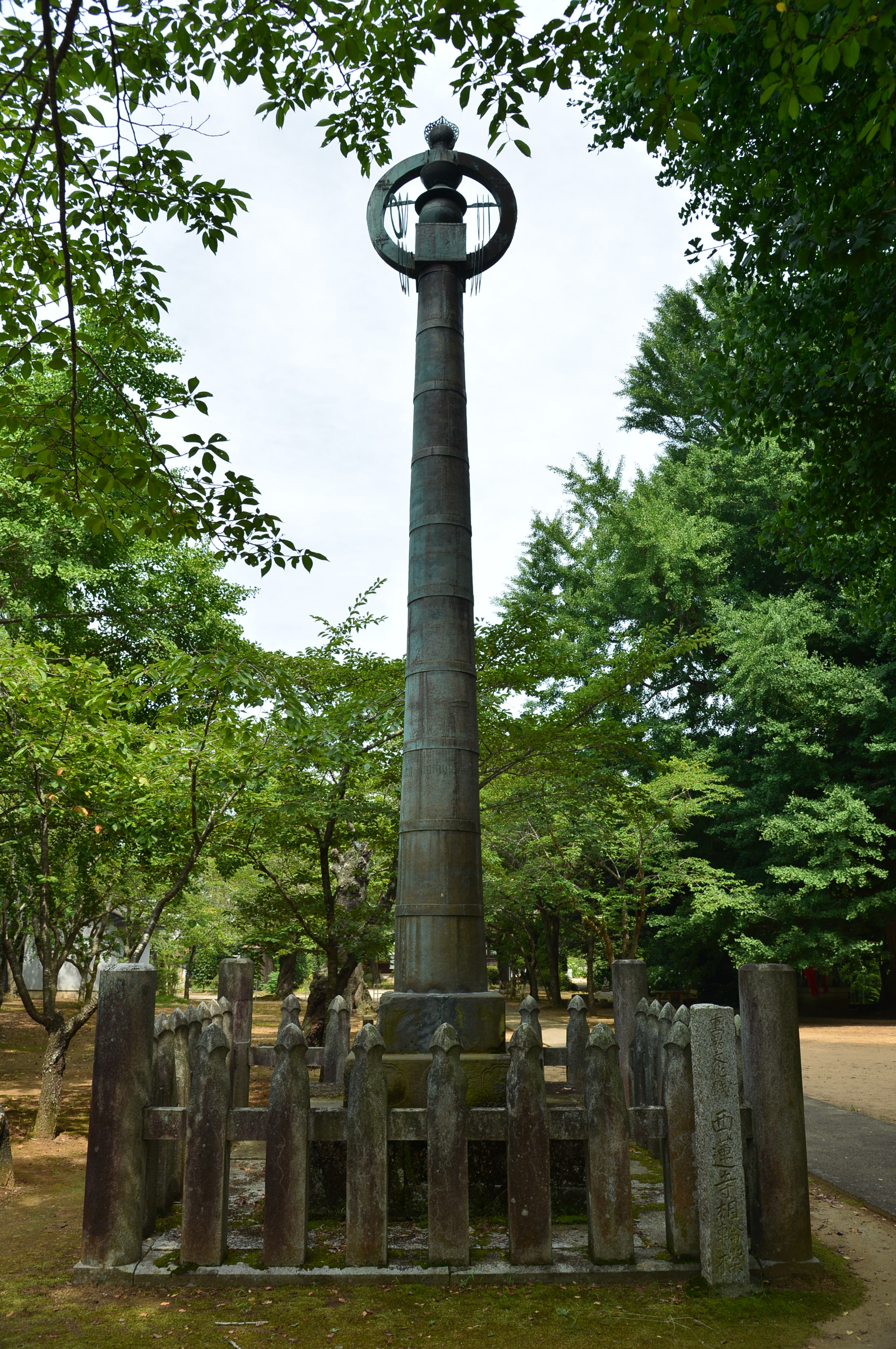 西蓮寺（茨城県行方市）の相輪橖（そうりんとう）